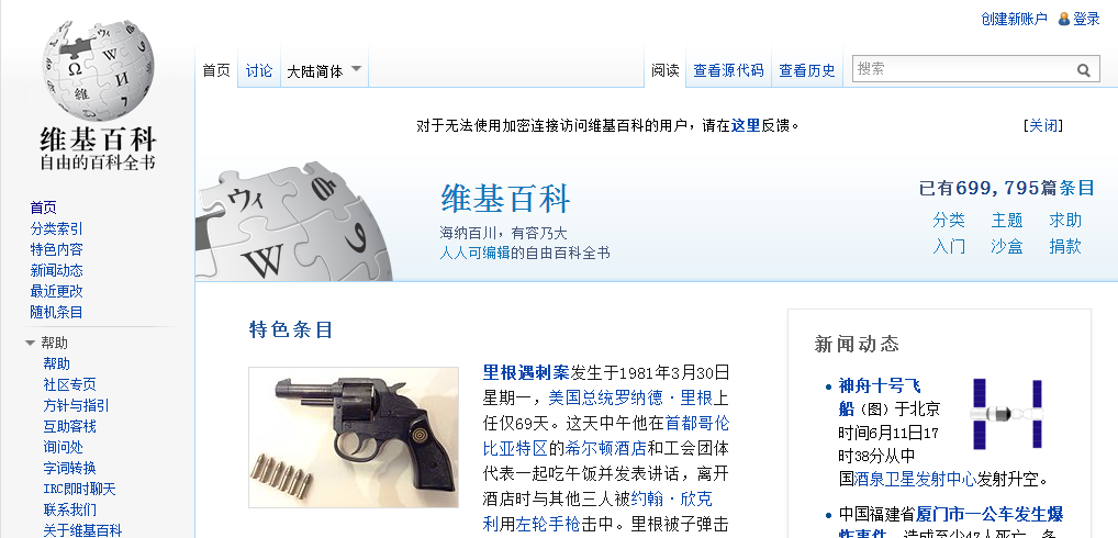 中文维基百科2013年6月被中国大陆政府封锁的首页告示。 提示信息为：对于无法使用加密连接访问维基百科的用户，请在这里反馈。